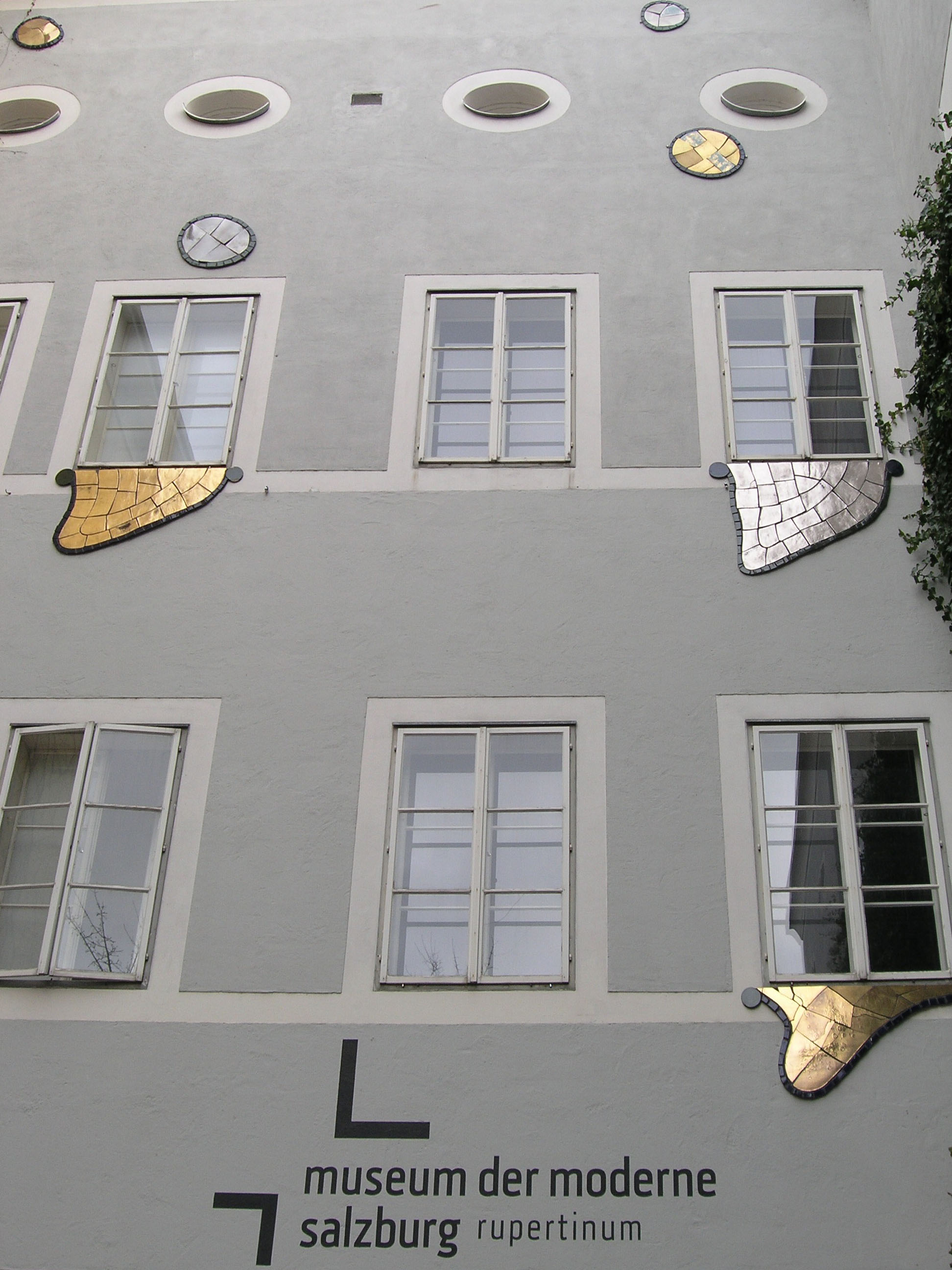 Zungenbart (Keramikfläche unterhalb eines Fensters)